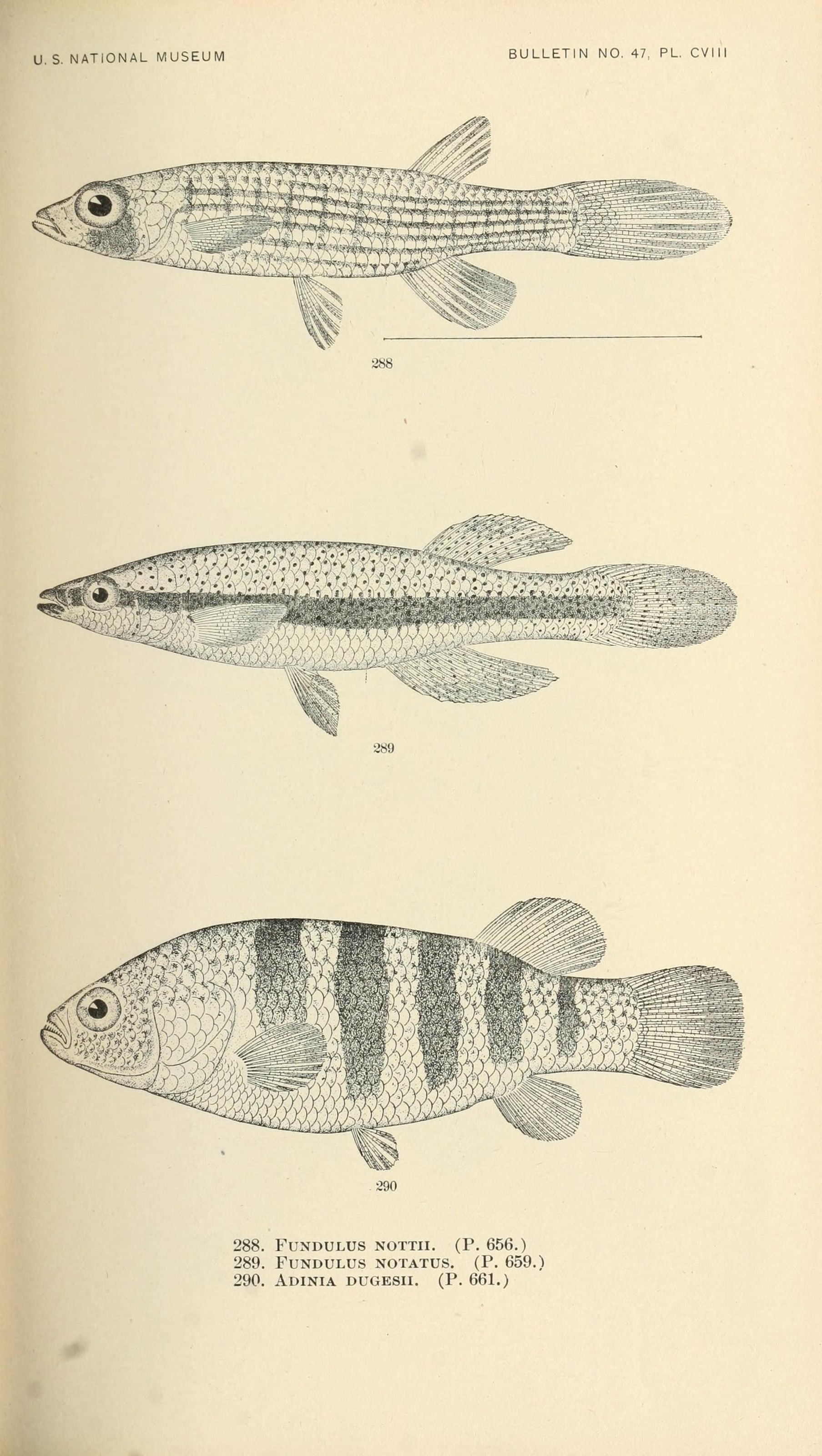 U. S. NATIONAL MUSEUM BULLETIN NO. 47, PL. CVIII ,±tm^ 388 290 288. FUNDULUS NOTTII. (P. 656.) 289. FUNDULUS NOTATUS. (P. 659.) 290. Adinia dugesii. (P. 661.)